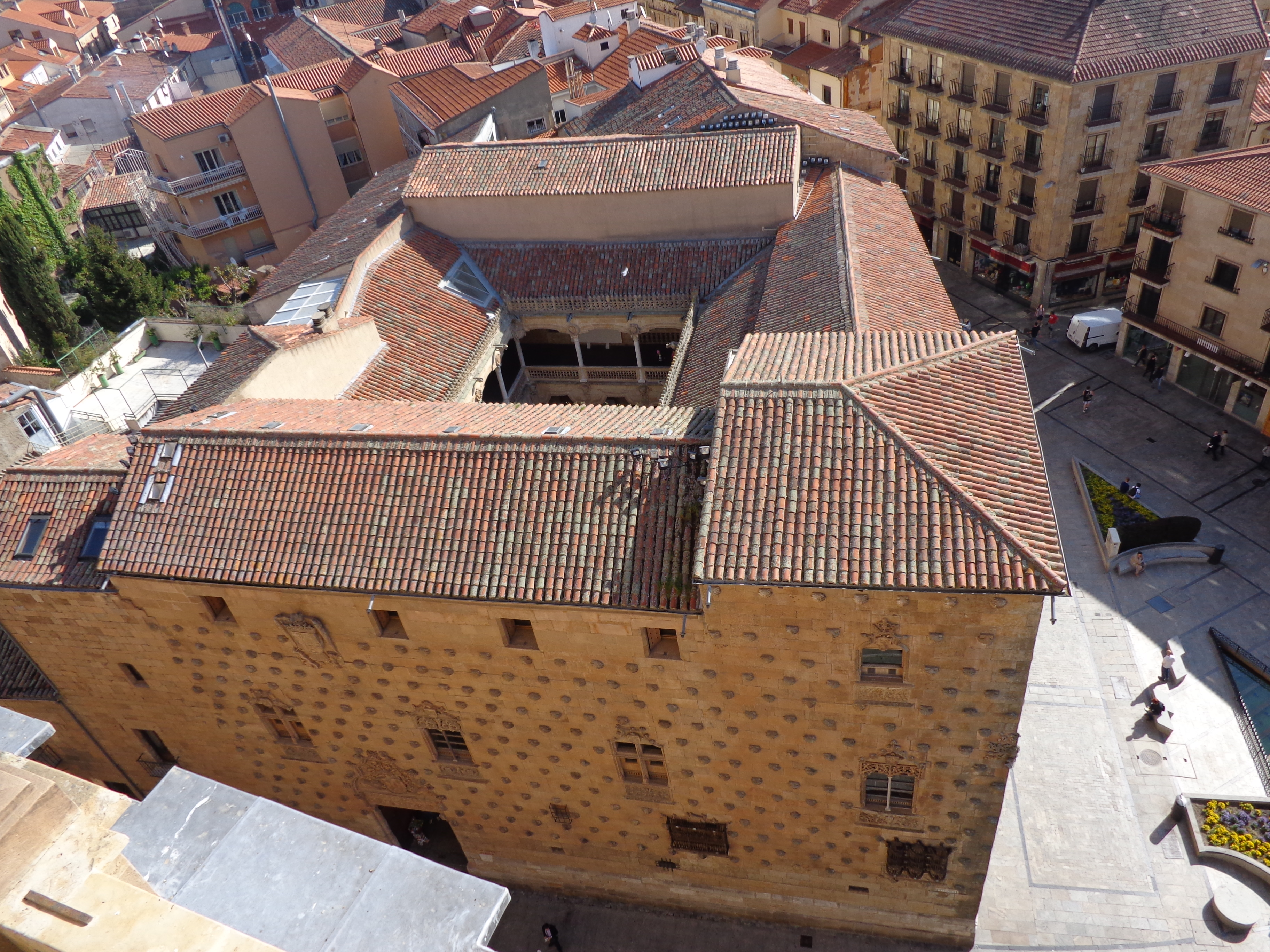 Casa de las Conchas, Salamanca